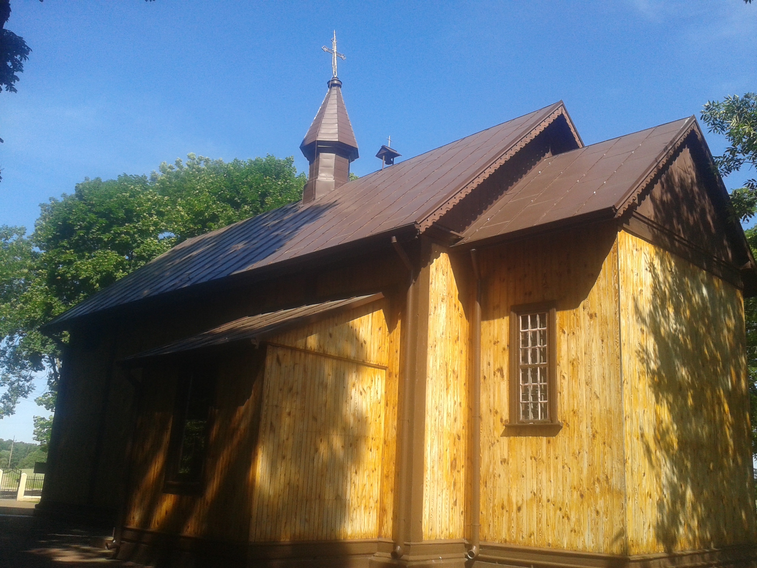 Kościół Narodzenia NMP w Ortelu Książęcym